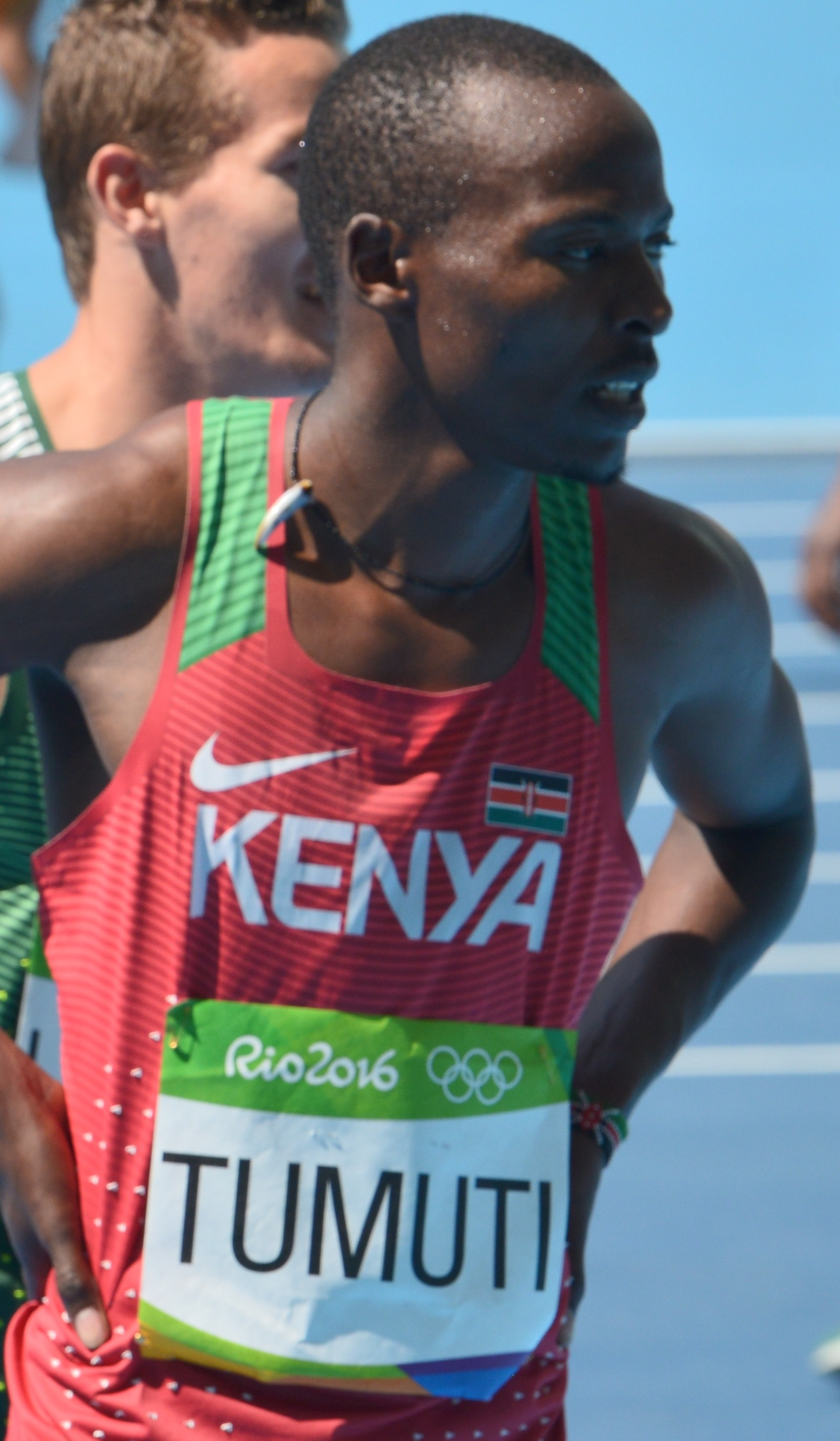 Boniface Mucheru à l'issue de sa série du 400n haies des jo de Rio 2016.